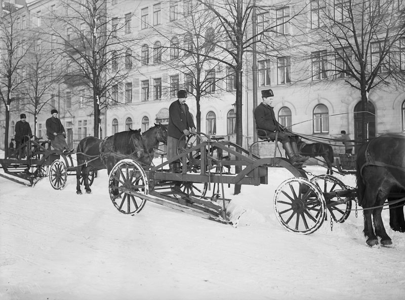 Snöplogning efter häst, Narvavägen strax ovanför Linnégatan på Östermalm i Stockholm.